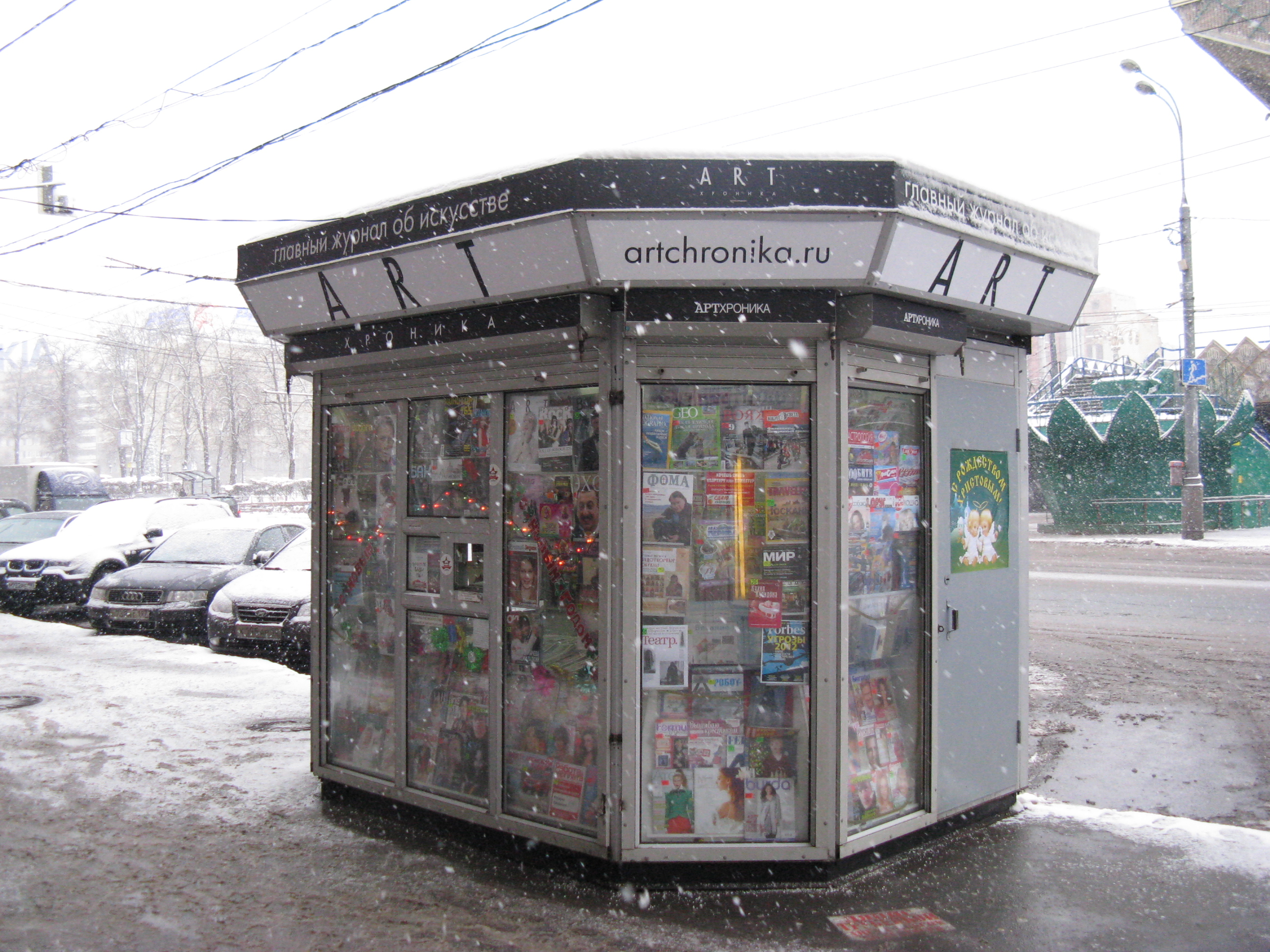 Один из трёх фирменных киосков журнала «Артхроника», что есть в Москве.